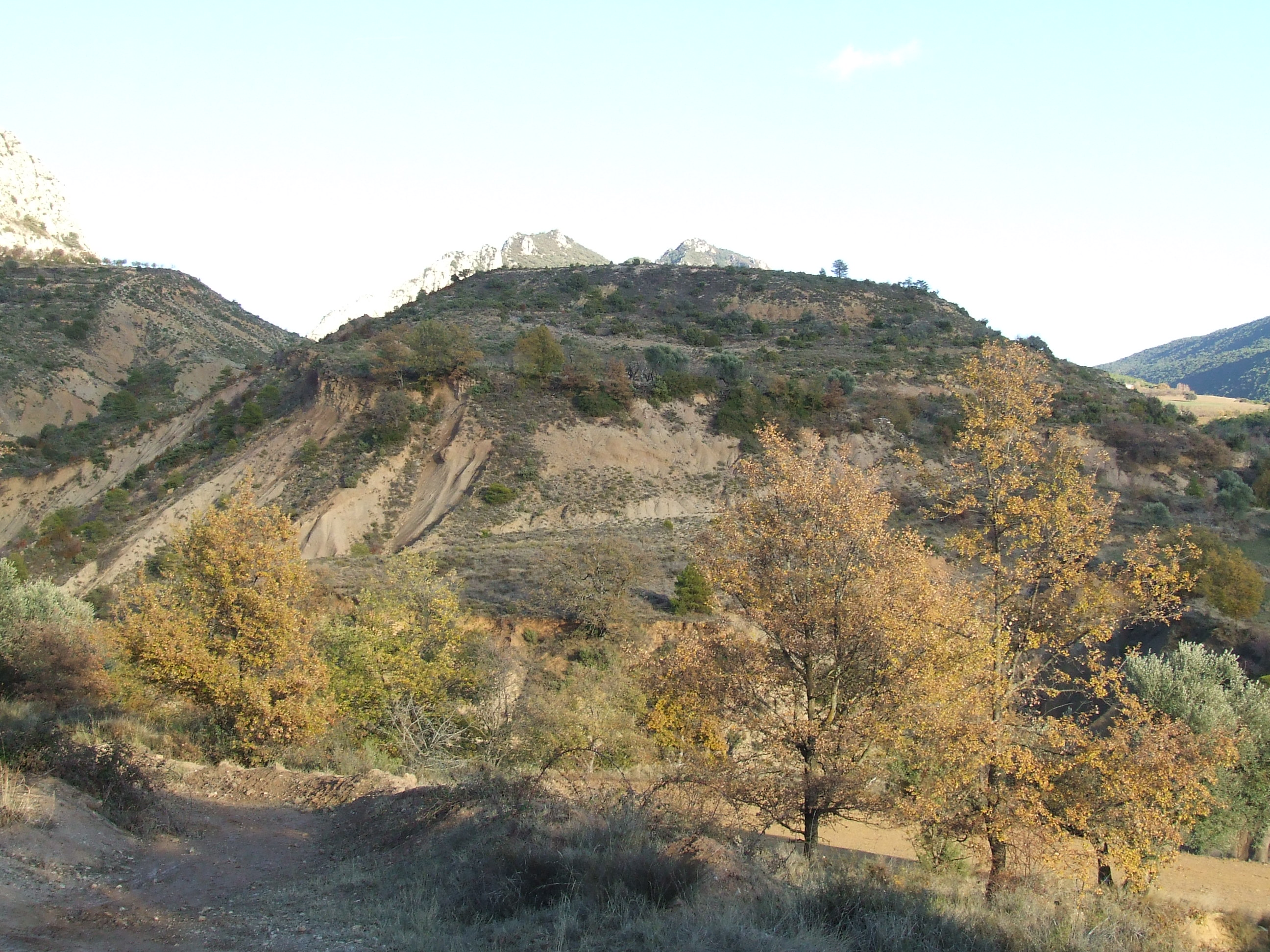 El Tossal del Montsor (Abella de la Conca, Pallars Jussà)